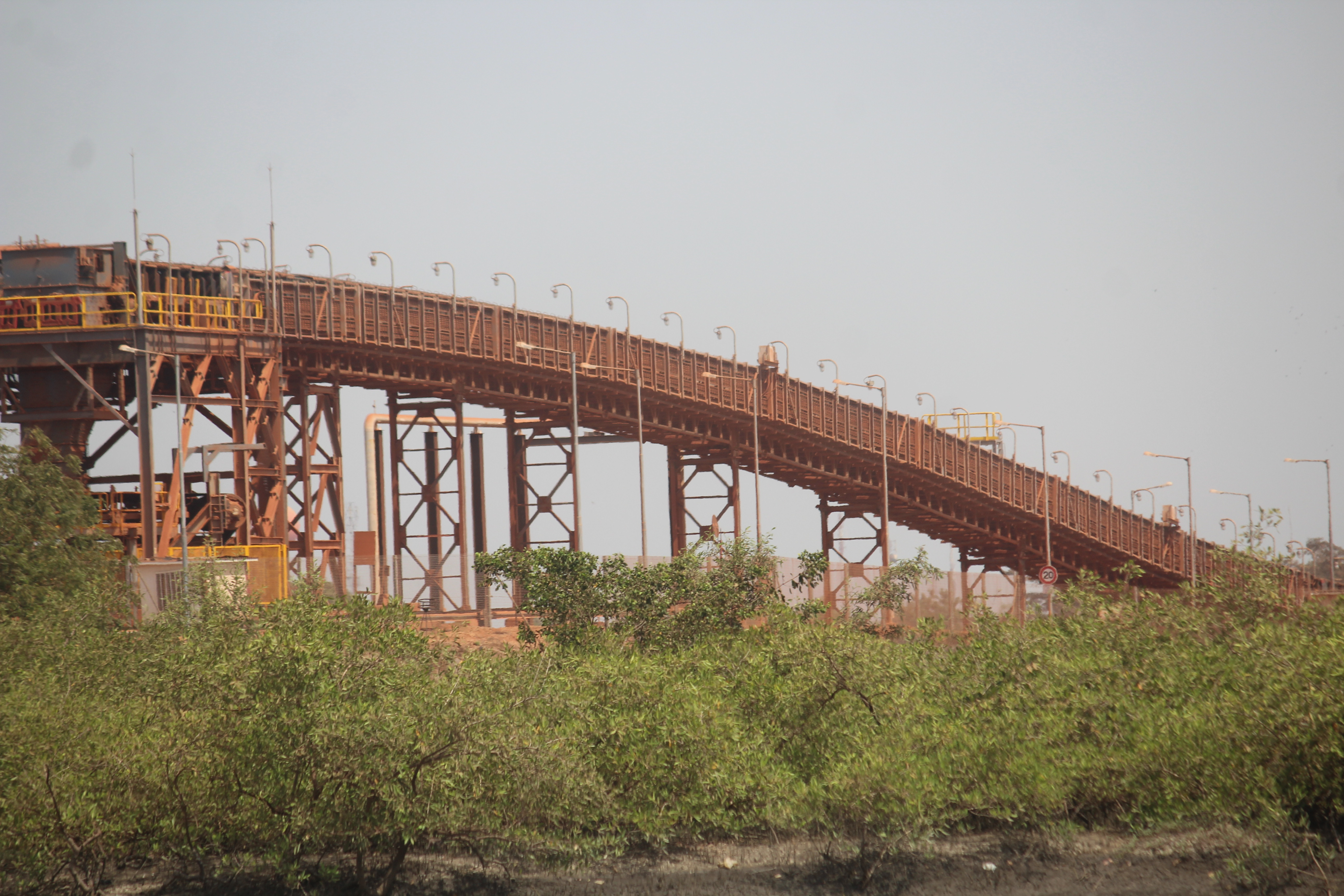 Tapis de GAC a kamsar This is an image with the theme "Africa on the Move or Transport" from: Guinea